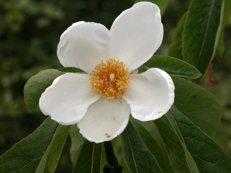 Franklinia alatamaha in Washington Park Arboretum, Seattle, WA